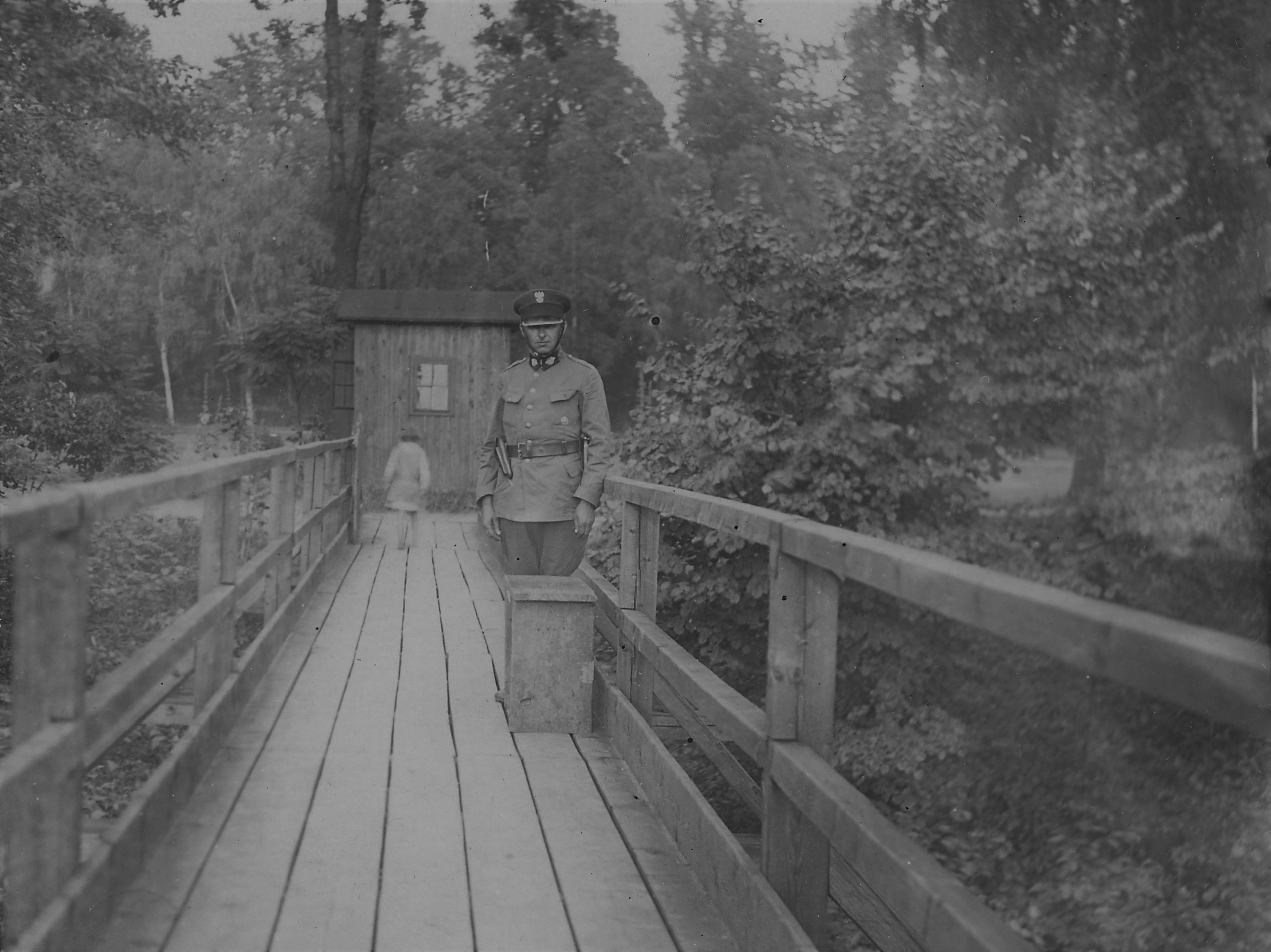 Posterunek Straży Granicznej na moście na rzece Olzie przy granicy z Czechosłowacją - żołnierz na moście podczas patrolu. Koncern Ilustrowany Kurier Codzienny - Archiwum Ilustracji Sygnatura: 1-G-6407